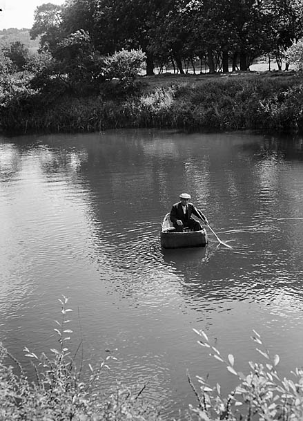 Teitl Cymraeg/Welsh title: Dyn a'i gwrwgl ar Afon Teifi, ger Aberteifi. Ffotograffydd/Photographer: Geoff Charles (1909-2002) Dyddiad/Date: 01/06/1952 Cyfrwng/Medium: Negydd ffilm / Film negative Cyfeiriad/Reference: (gch03430) Rhif cofnod / Record no.: 3368751 Rhagor o wybodaeth am gasgliad Geoff Charles yn Llyfrgell Genedlaethol Cymru More information about the Geoff Charles Collection at the National Library of Wales Mae ffotograffau Geoff Charles hefyd yn rhan o Broject Europeana Libraries Geoff Charles' photographs also form part of the Europeana Libraries Project